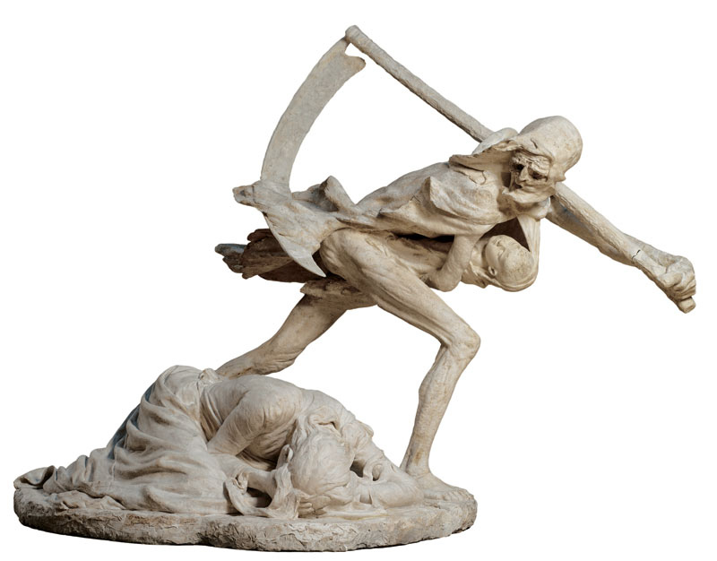 Niels Hansen Jacobsen (1861-1941), "Døden og moderen", 1892. Statens Museum for Kunst / National Gallery of Denmark.